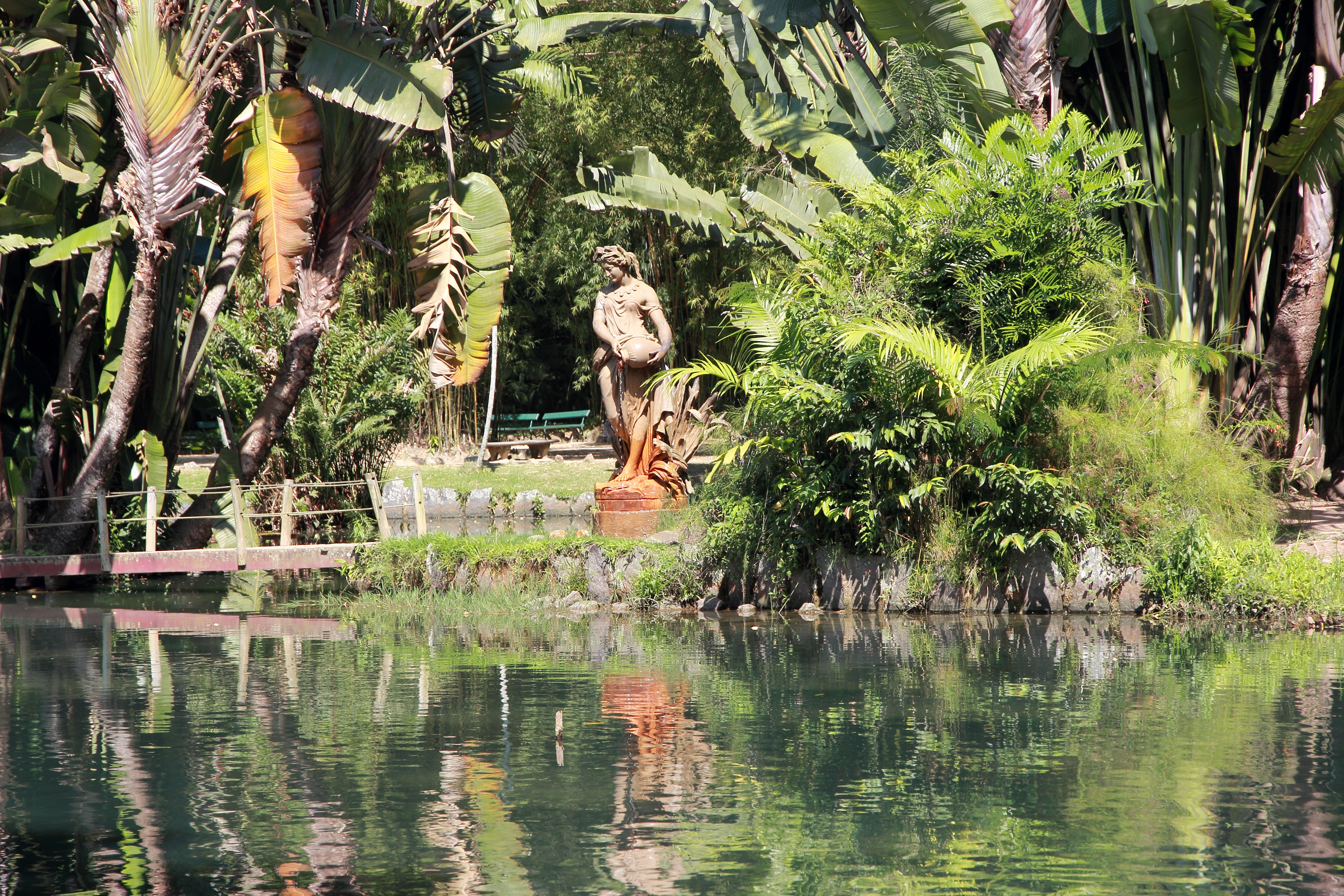 Jardim Botânico do Rio de Janeiro - Estátua da Deusa Thetis, de Louis Sauvageau (1862), no Lago Frei Leandro.